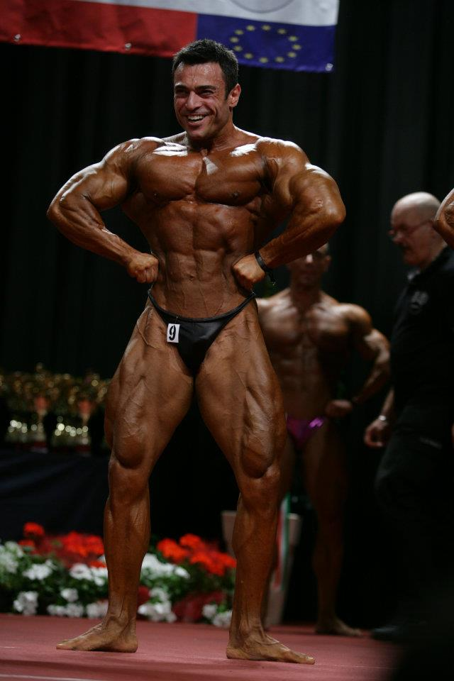 Wabba World 2012 İtaly